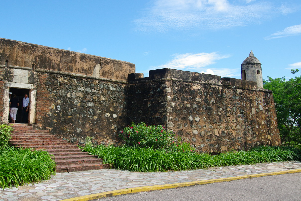 Castillo de Santa Rosa, La Asuncion